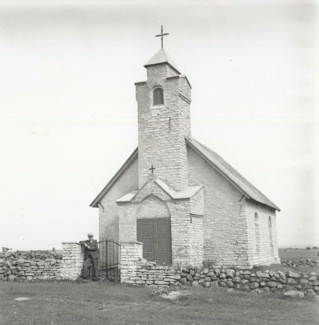 Suur-Pakri kabel